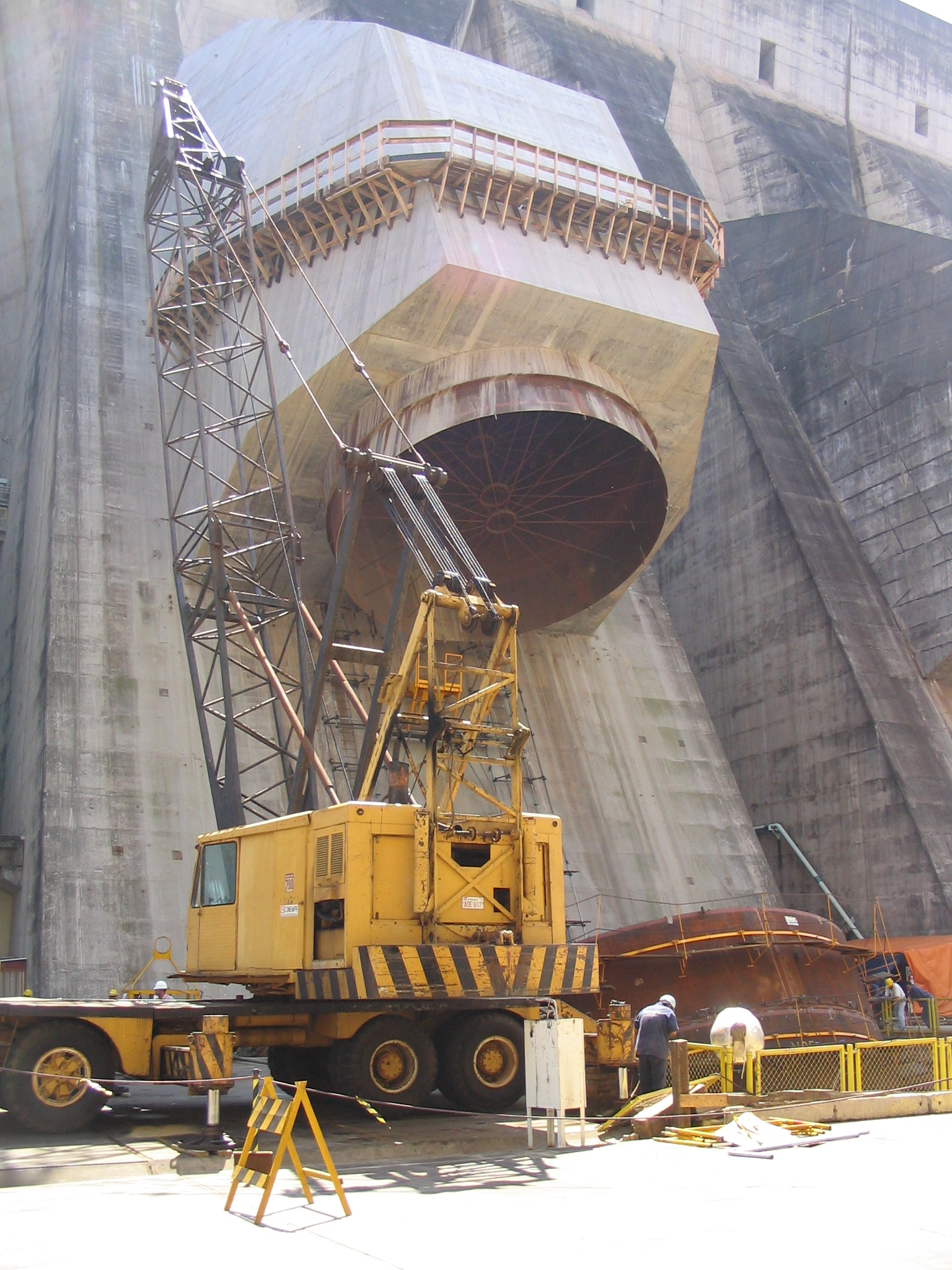 Itaipu Binacional-Construção da turbina 18